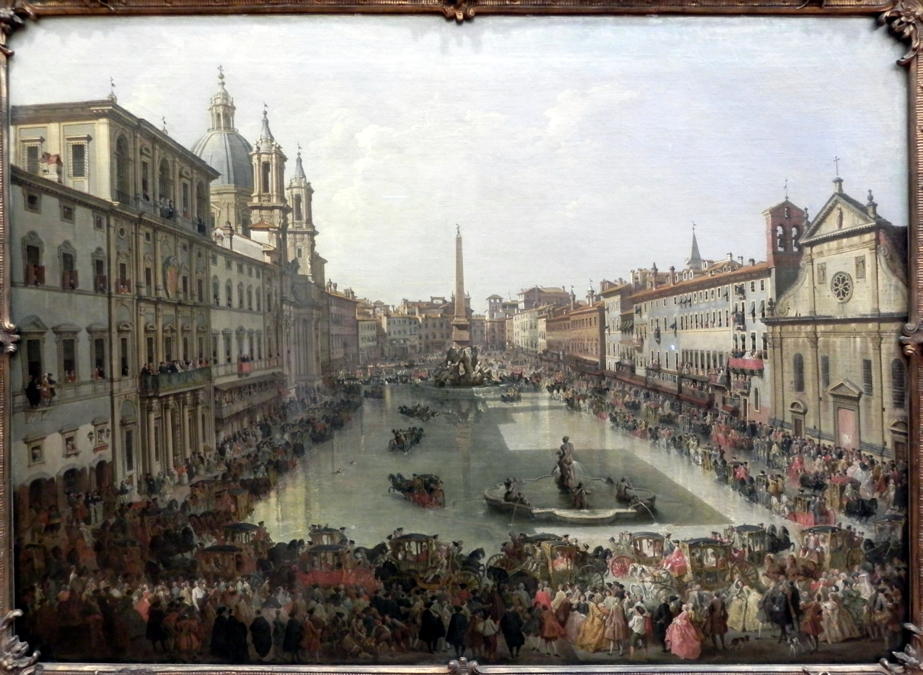 Piazza Navona, Romelabel QS:Len,"Piazza Navona, Rome" label QS:Lde,"Piazza Navona in Rom unter Wasser gesetzt, zur Festa del Lago (Seefest)"